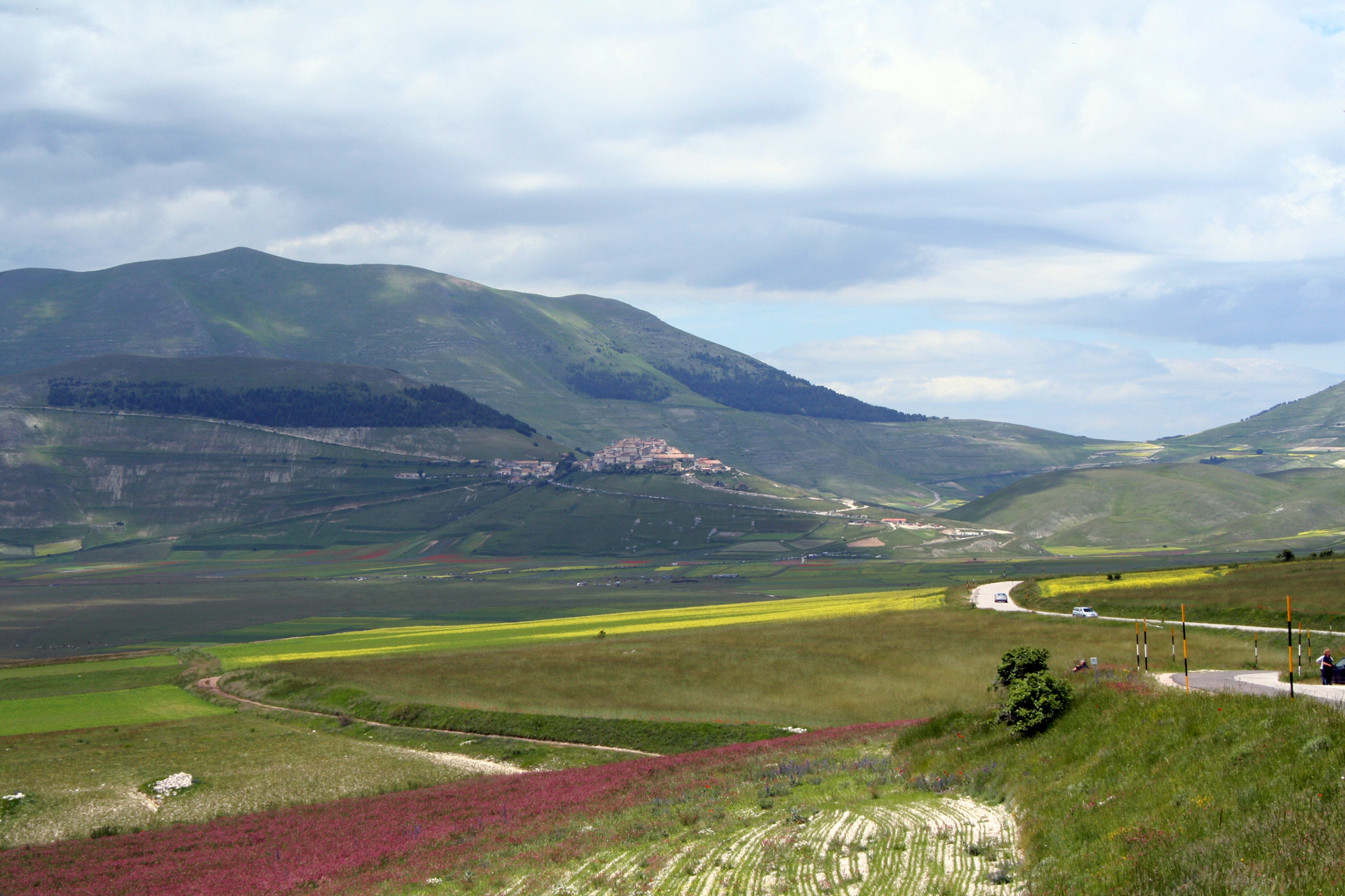 Panorama del paese di Castelluccio di Norcia, in provincia di Perugia.